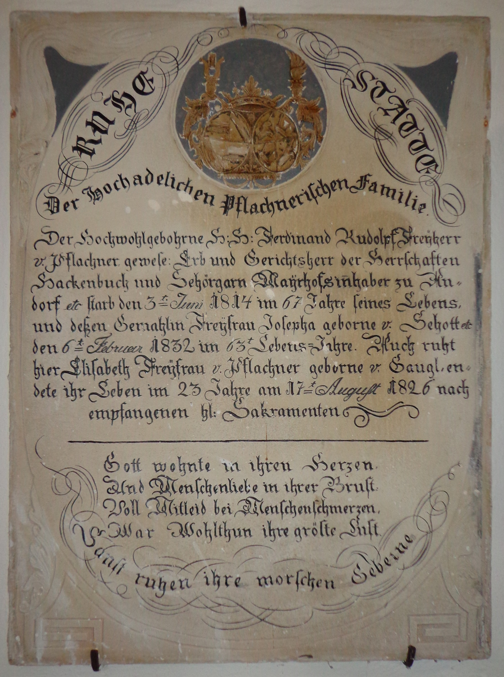 Grabdenkmal der Familie von Pflachern (Inhaber des Andorfer Meierhofes des Domkapitels Passau sowie des Schlosses Schörgern bei Andorf) in der Pfarrkirche von Andorf mit Nennung des Ferdinand Rudolf von Pflachern (+ 1814), seiner Gemahlin Josepha von Pflachern geb. von Schott (+ 1832), und der Elisabeth von Pflachern geb. von Gaugl (+ 1826). Eine wissenschaftliche Bearbeitung liegt vor in SEDDON Christopher R., Die inschriftlichen Denkmäler der Herren und Freiherren von Hackledt. Grablegen, Memoria und Repräsentation eines Innviertler Landadelsgeschlechtes, Wien (Dipl. Arb.) 2002, S. 218-222.